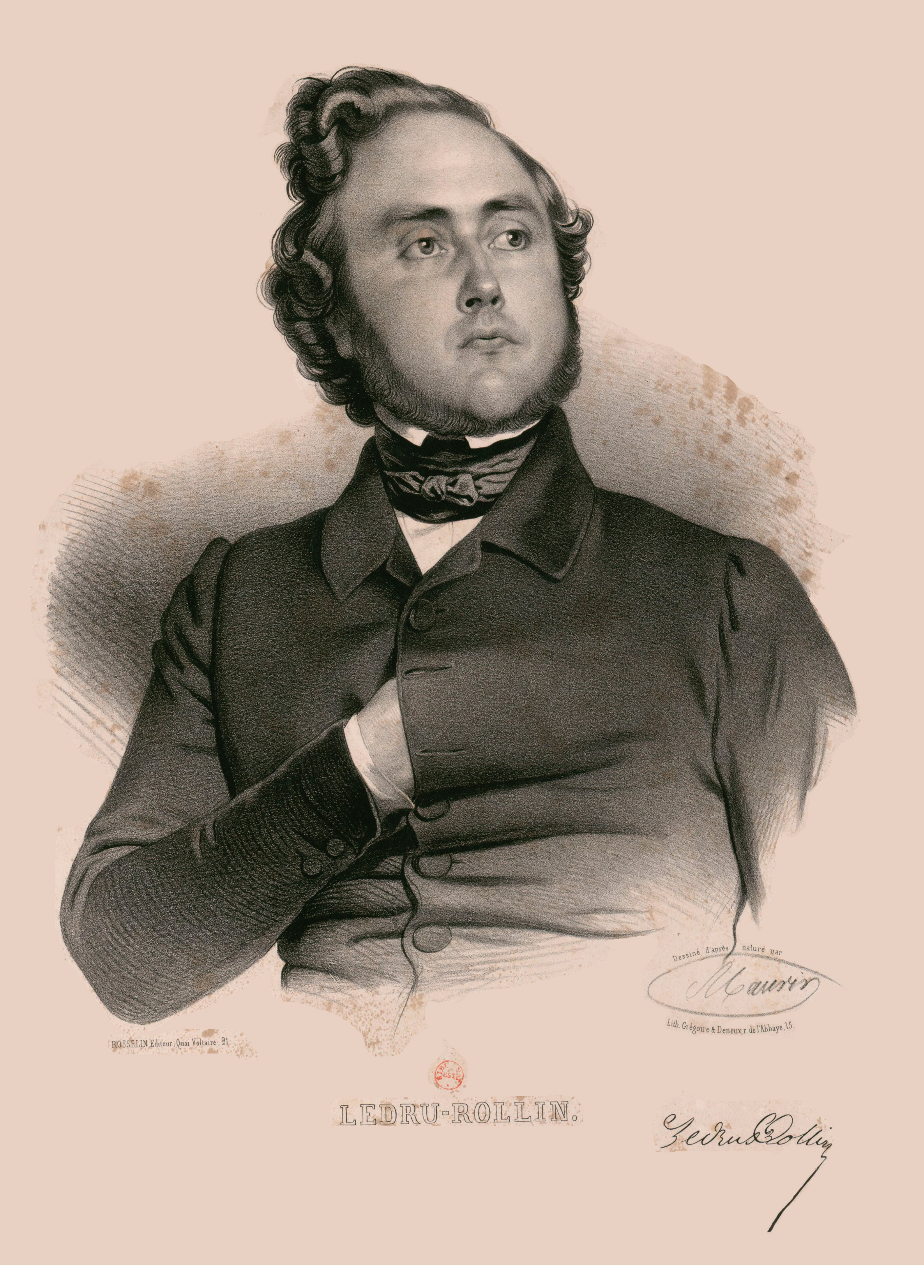 Ledru-Rollin - lithographie de Maurin.